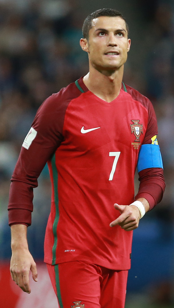 Португалия - Чили